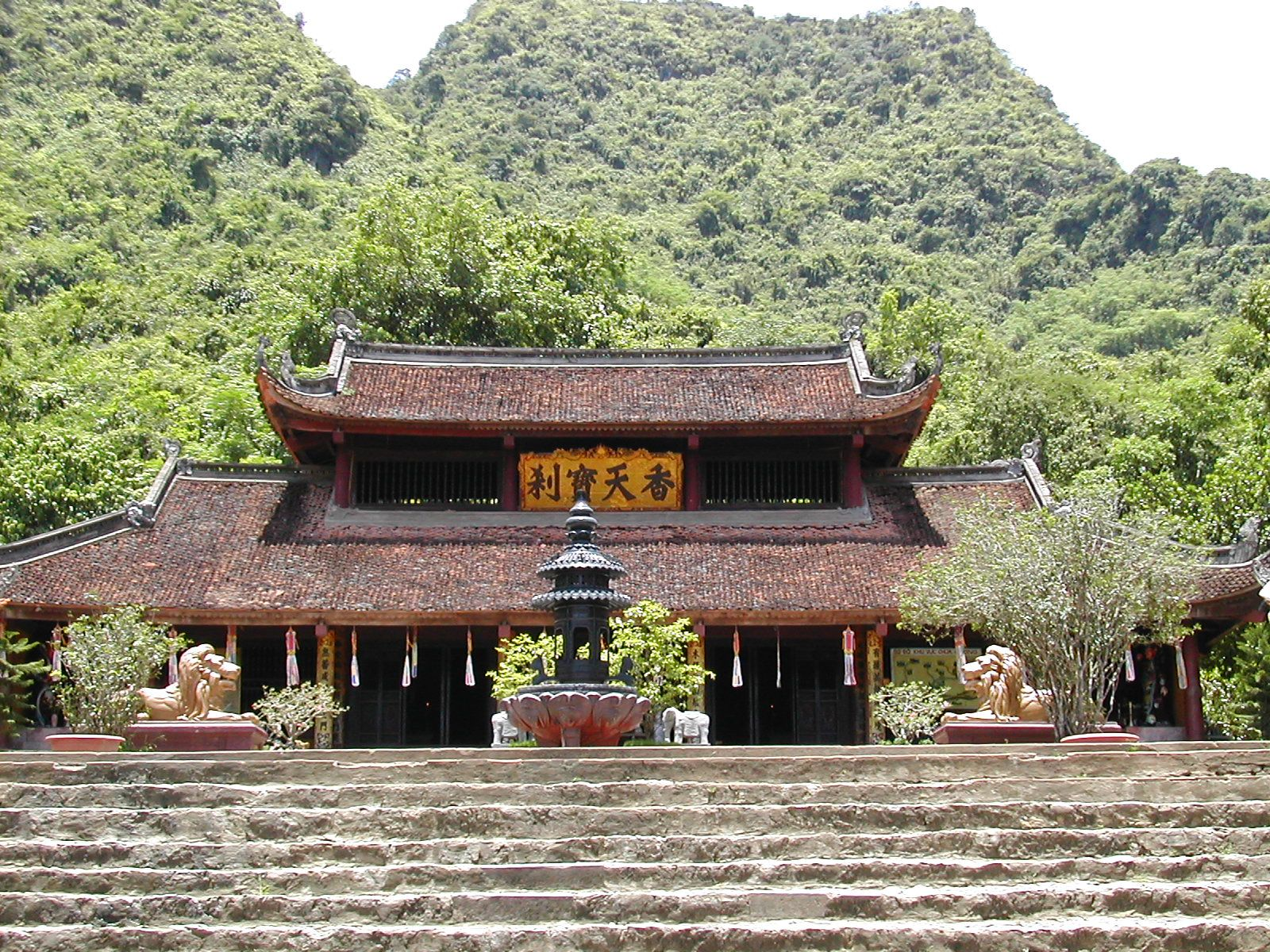 Thiên Trù Pagoda